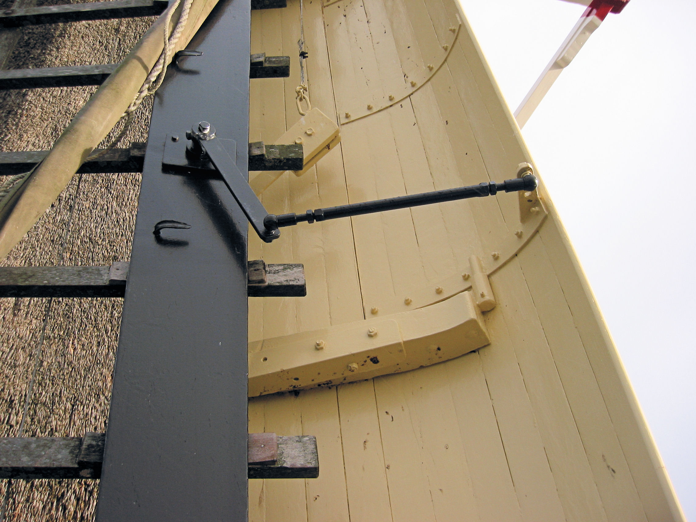 Molen het Hert, Fauel fokwiek, Putten, Gelderland, the Netherlands